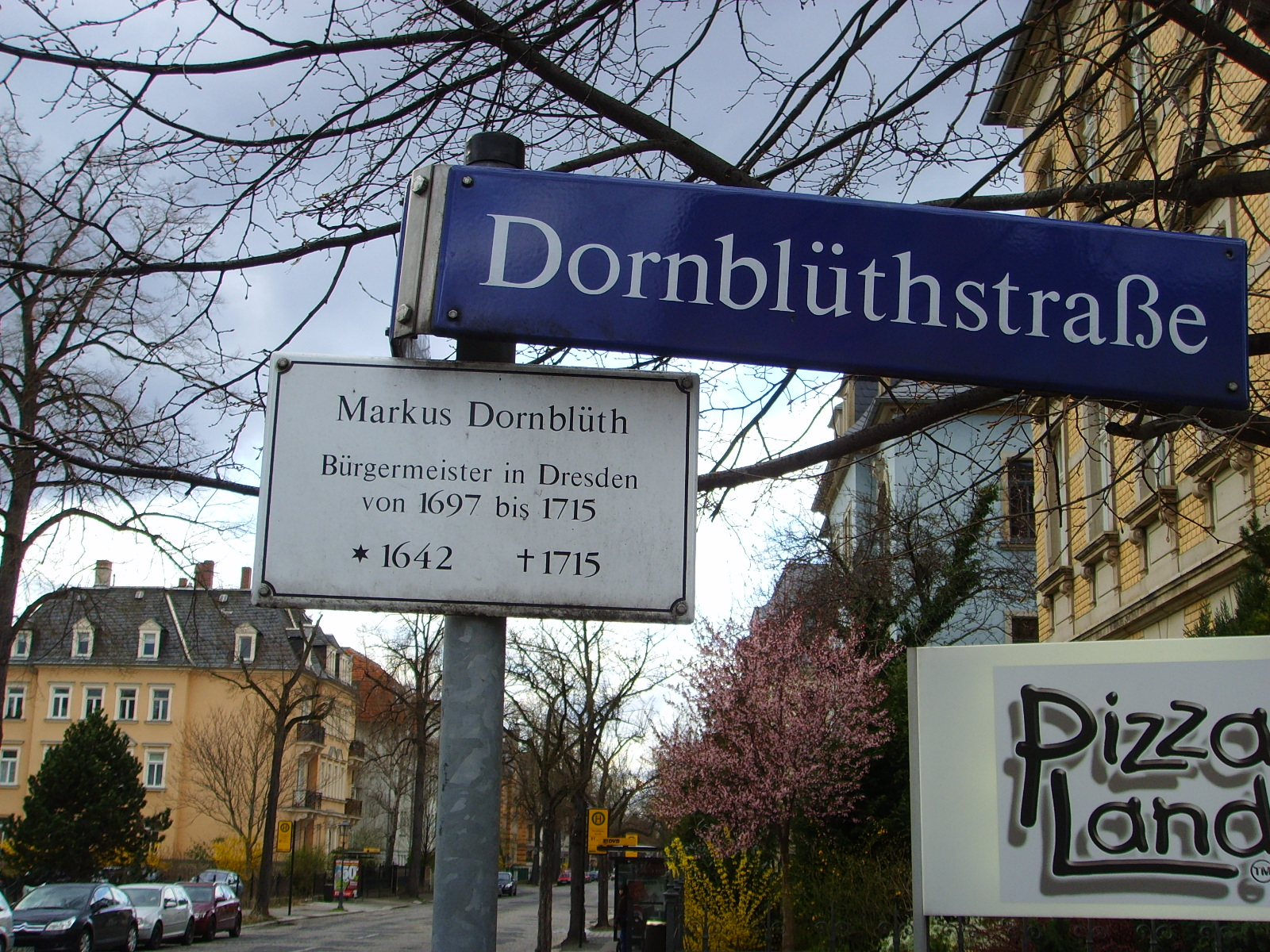 Straßenschild Dornblüthstraße Dresden